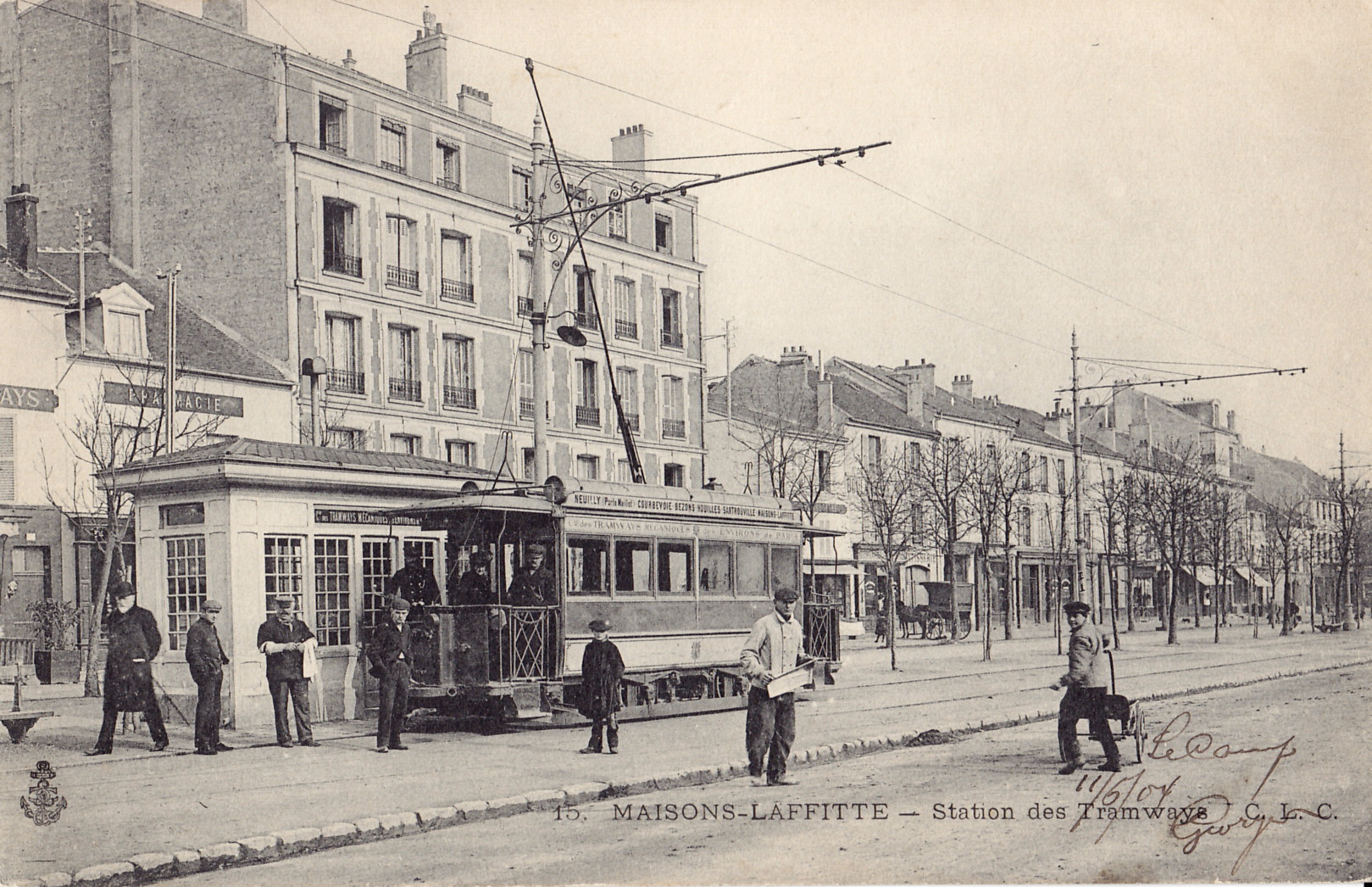 Carte postale ancienne éditée par CLC, n°15 :MAISONS-LAFFITTE - - Station des Tramways